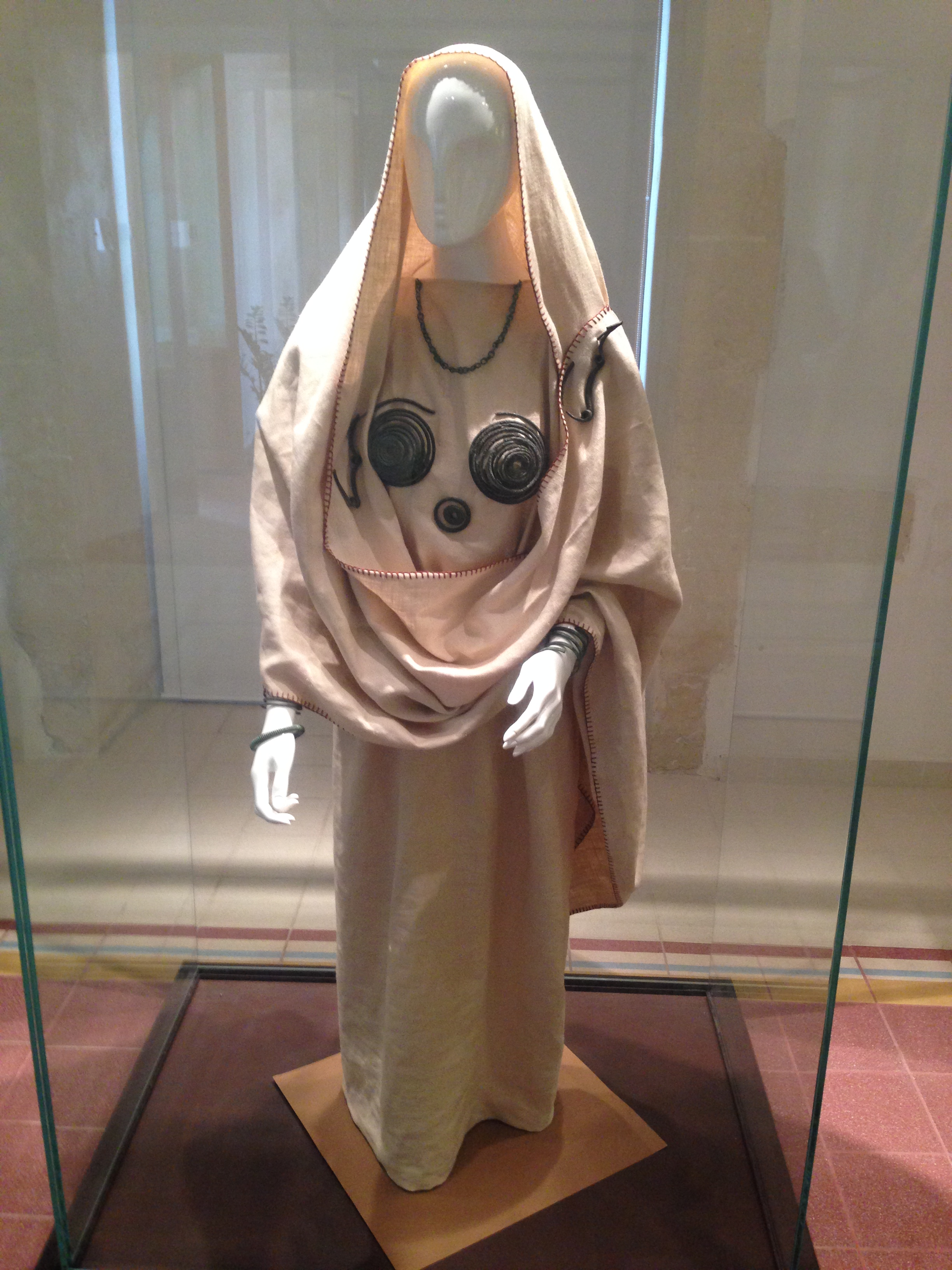 Figura femminile con abiti protostorici e gioielli, ipotesi ricostruttiva.